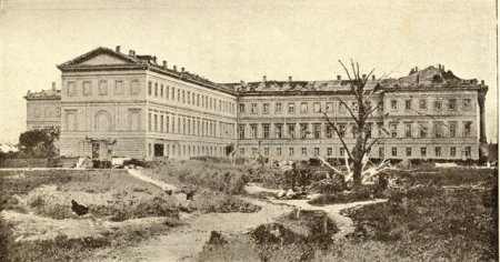 Hurricane of June 16, 1904. The damaged Cadet barracks, Lefortovo, Moscow/Ураган 16 июня 1904 г. I и II кадетские корпуса в Лефортове, в Москве.